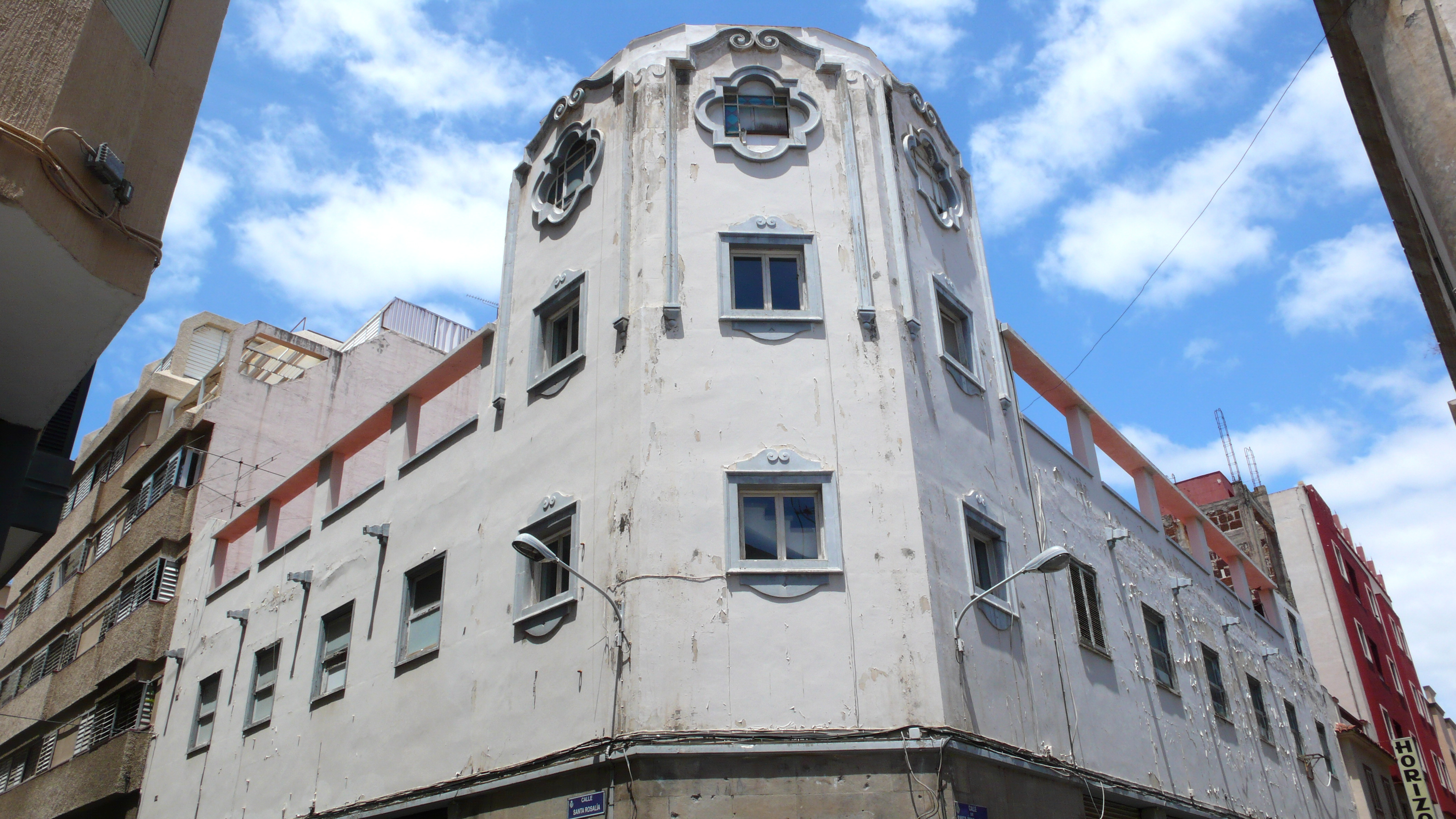 Cine Royal Victoria (desaparecido) Santa Cruz de Tenerife